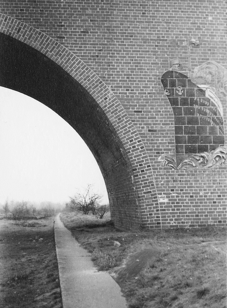 Unvollständiger Autobahnabschnitt Hamburg-Berlin (bei Hamburg) 1960